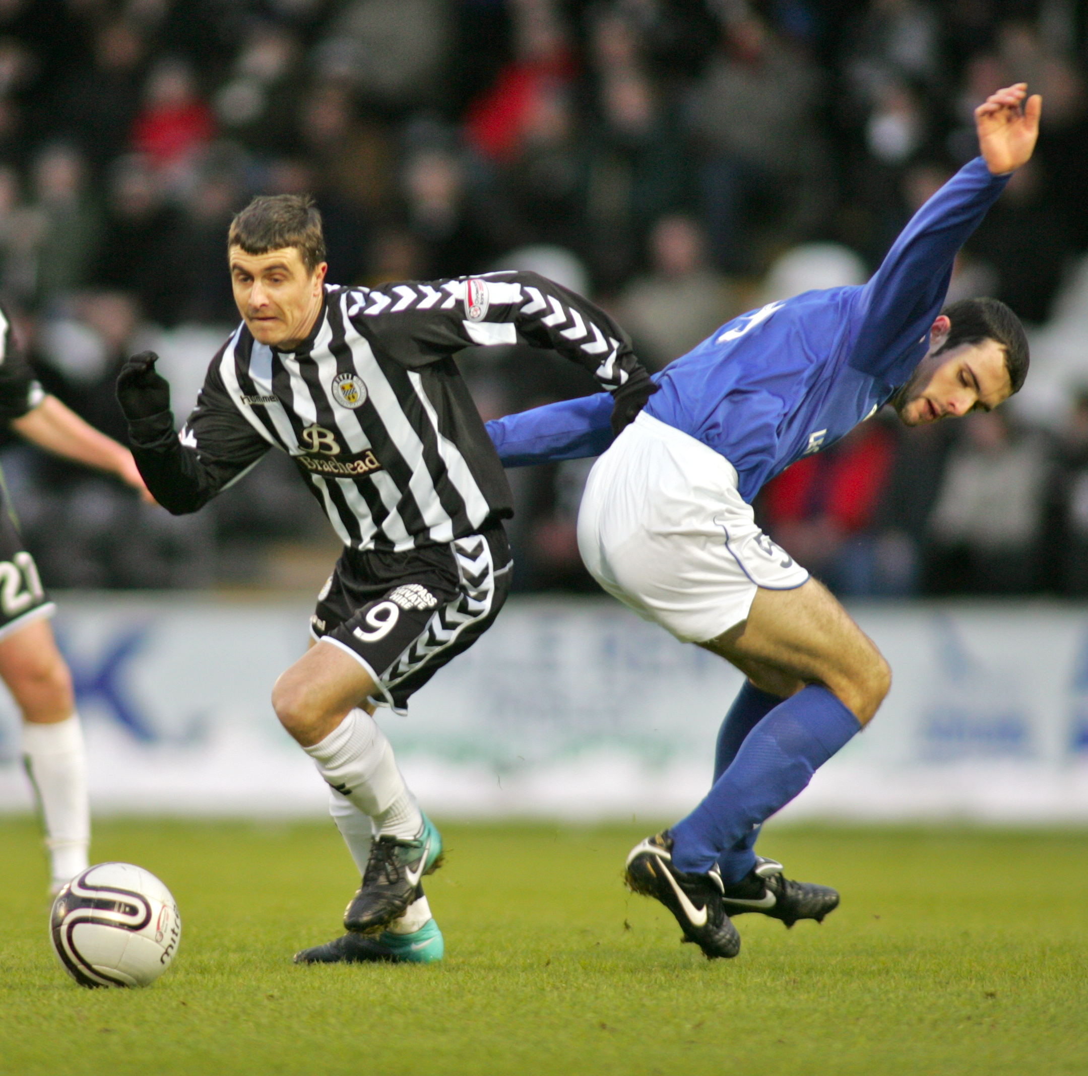 St Mirren vs Peterhead